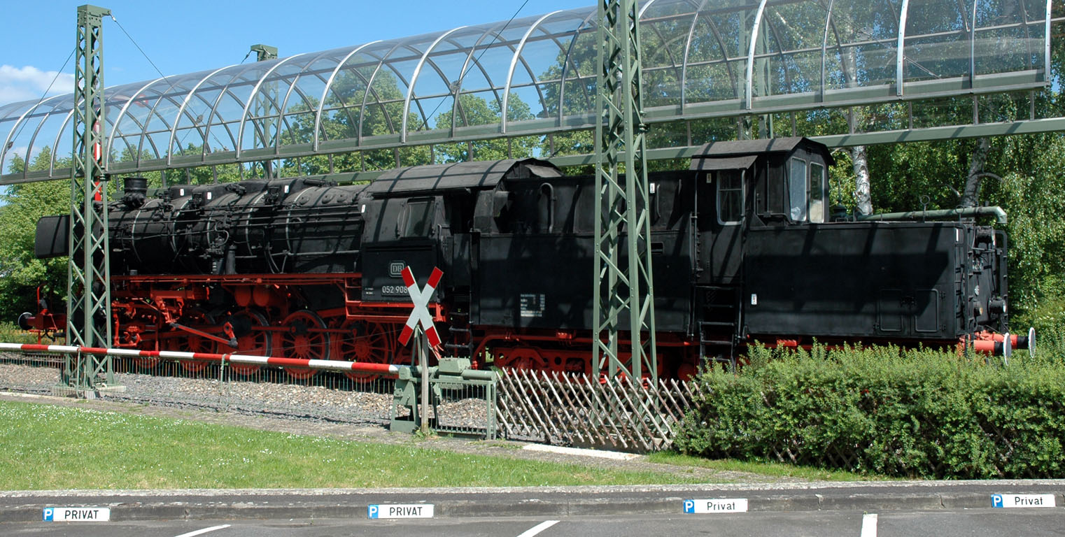 Denkmallok 52 908 am Bahnhof Lauda.